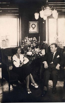 Tapolczai Gyula (1903-1954) és felesége, Erzsi otthonukban esküvőjükkor